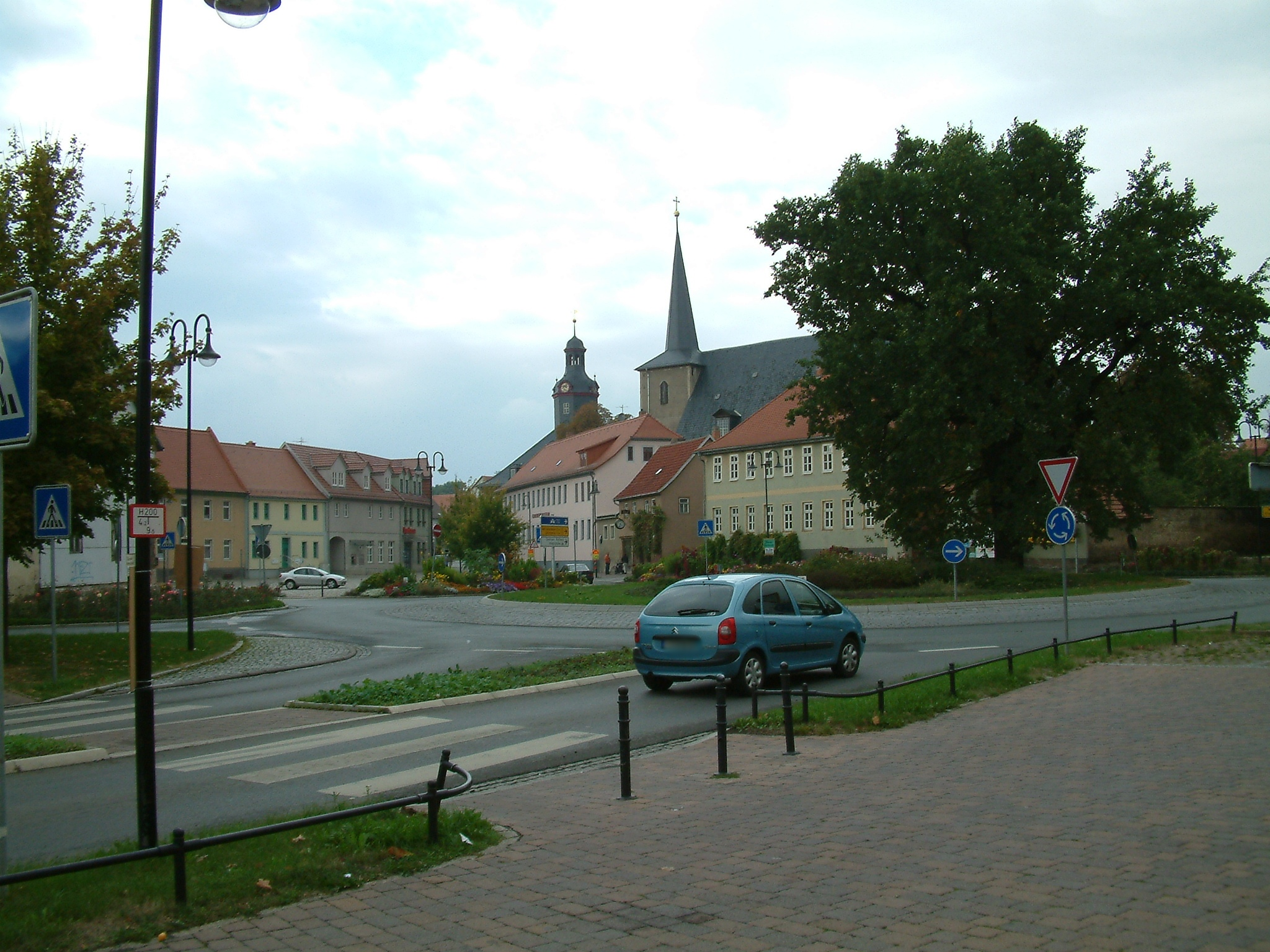 Koelleda, Landkreis Soemmerda, Thueringen, Deutschland